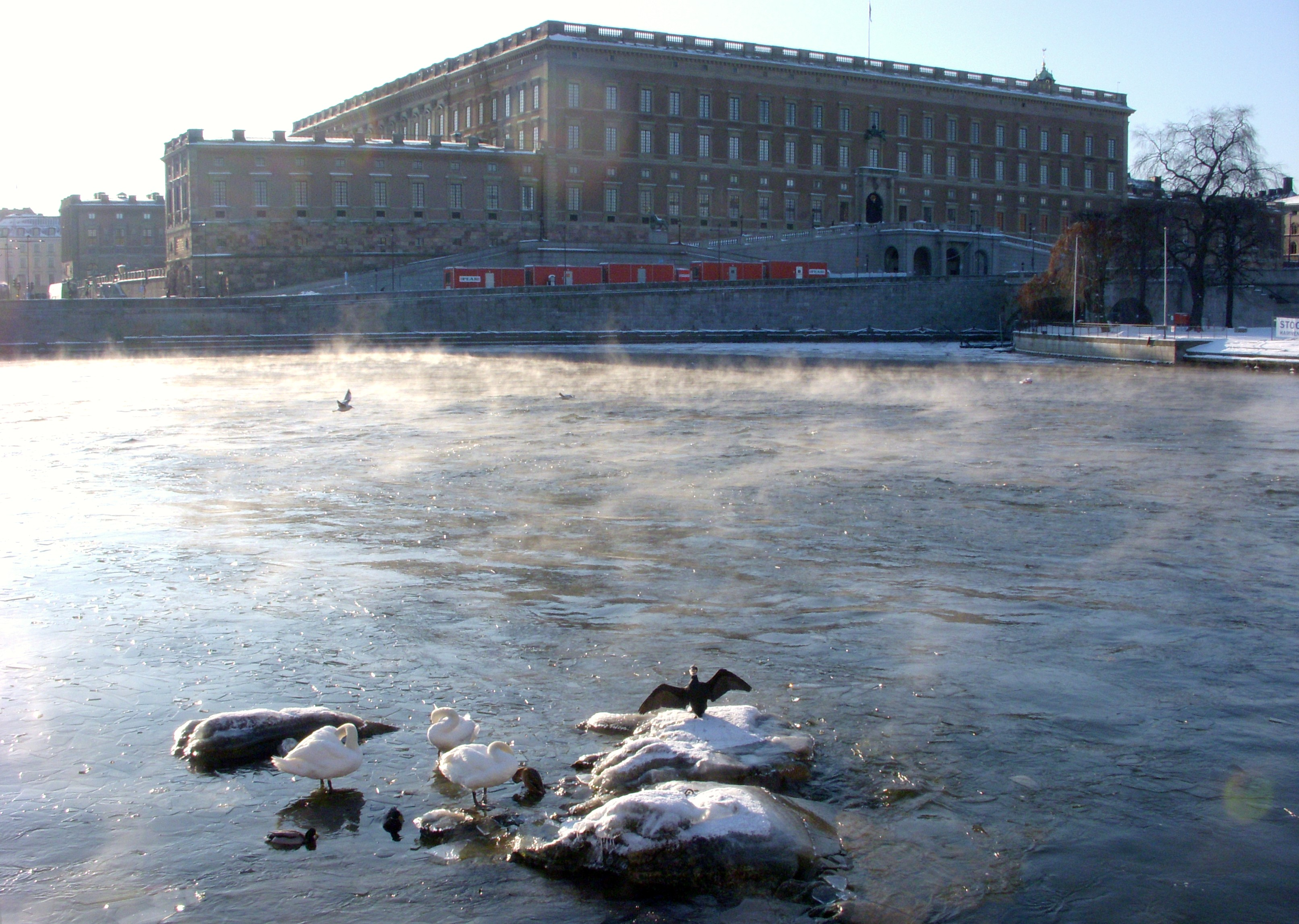 Norrström en kall febrauridag med Stockholms slott i bakgrunden